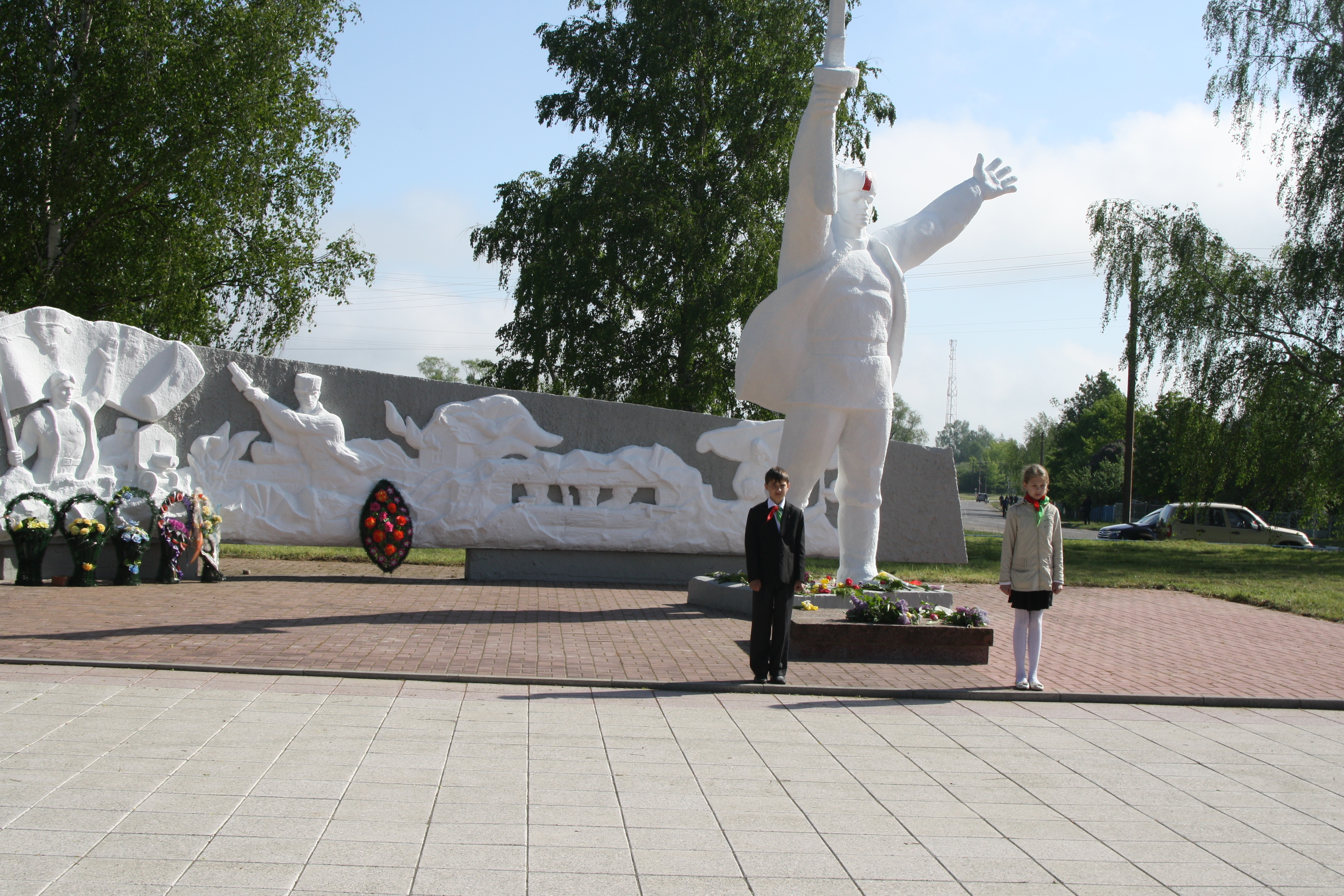 Мемарыяльны комплекс Здзітаўская абарона